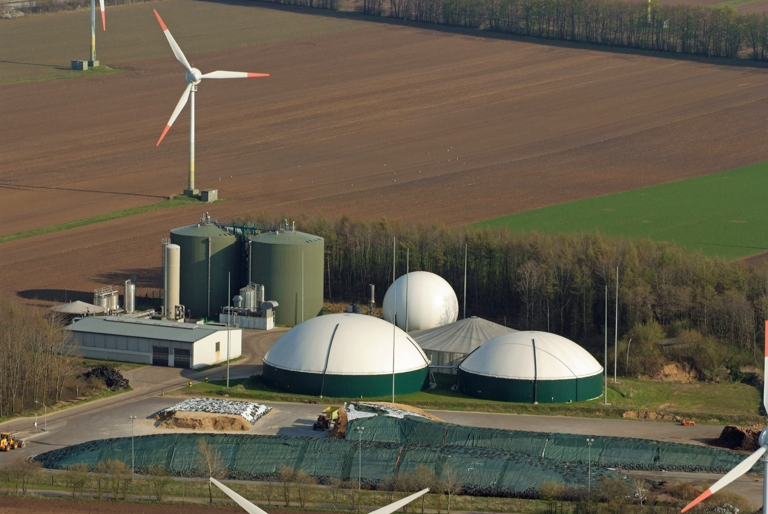 Biogasanlage in Land Wursten / Fotoflug von Nordholz-Spieka nach Oldenburg und Papenburg